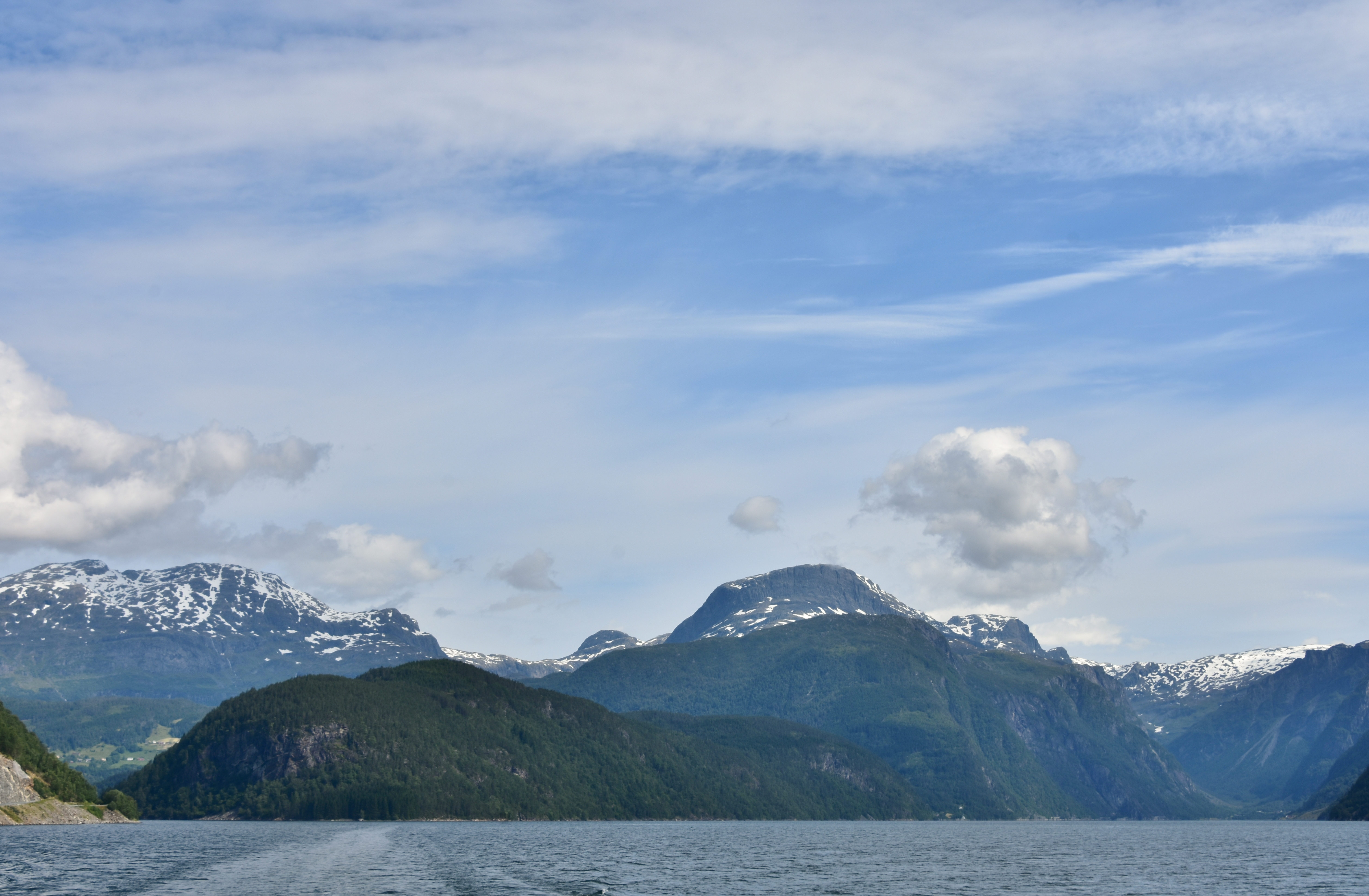 Hardangerfjord in a Nutshell (13)